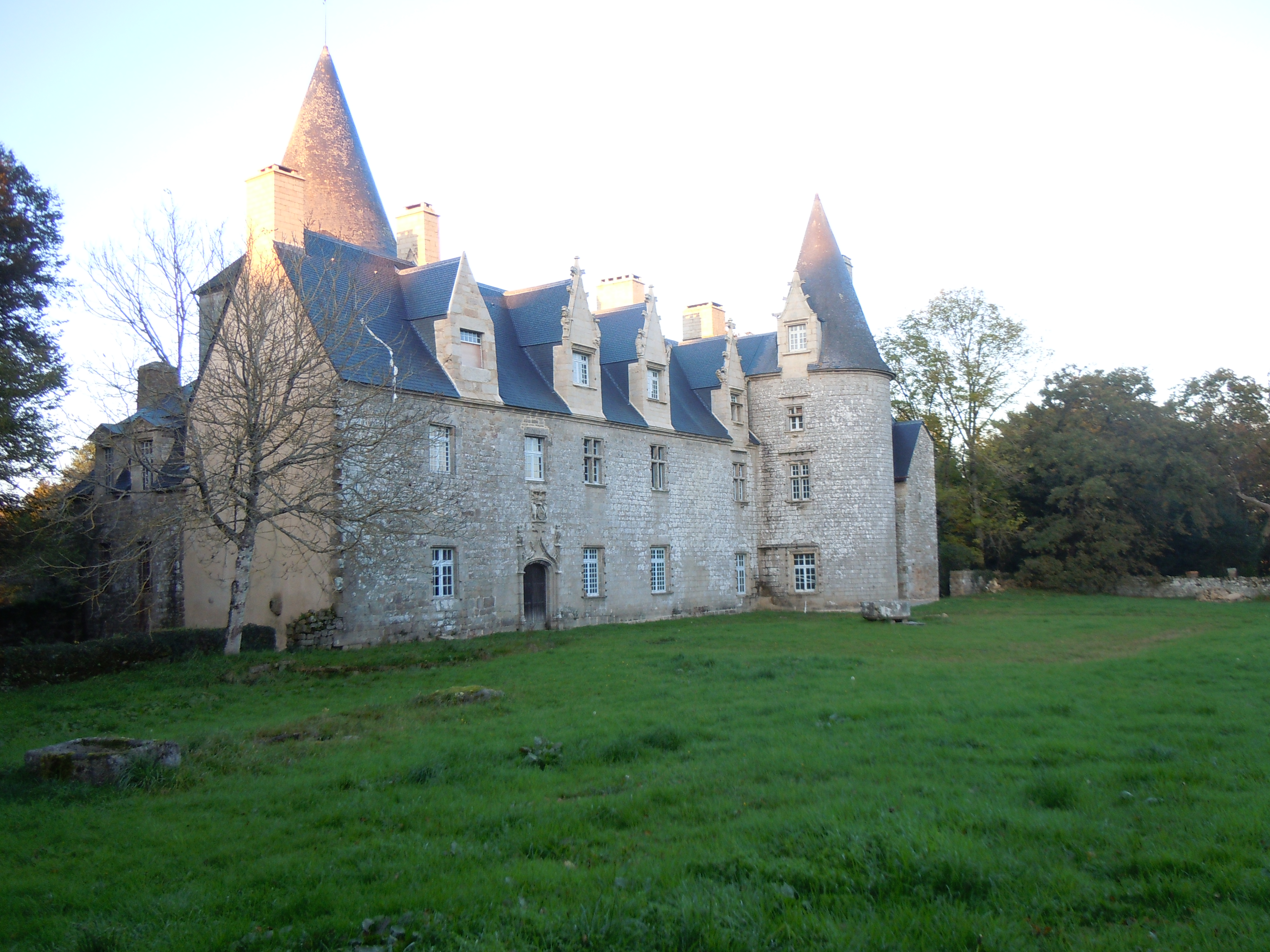 vue extérieur de la façade du château de La Villeneuve-Jacquelot (commune de Quistinic dans le Morbihan)